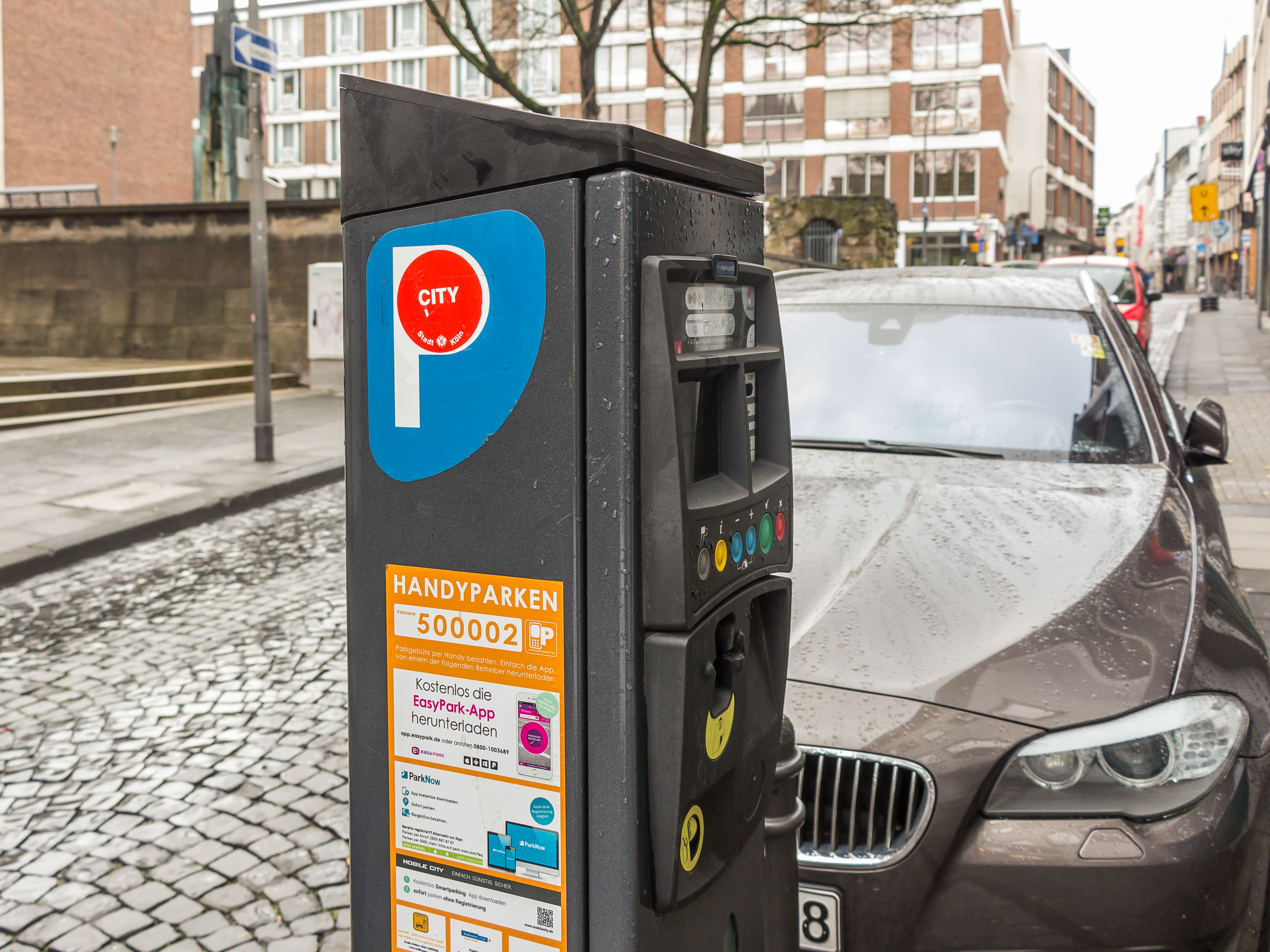 Parkscheinautomat mit dem Hinweis auf Handyparken in der Kleine Budengasse, Köln